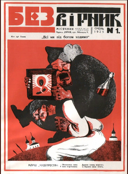 Обложка журнала "Безвирник" 1925 год, Январь. № 1